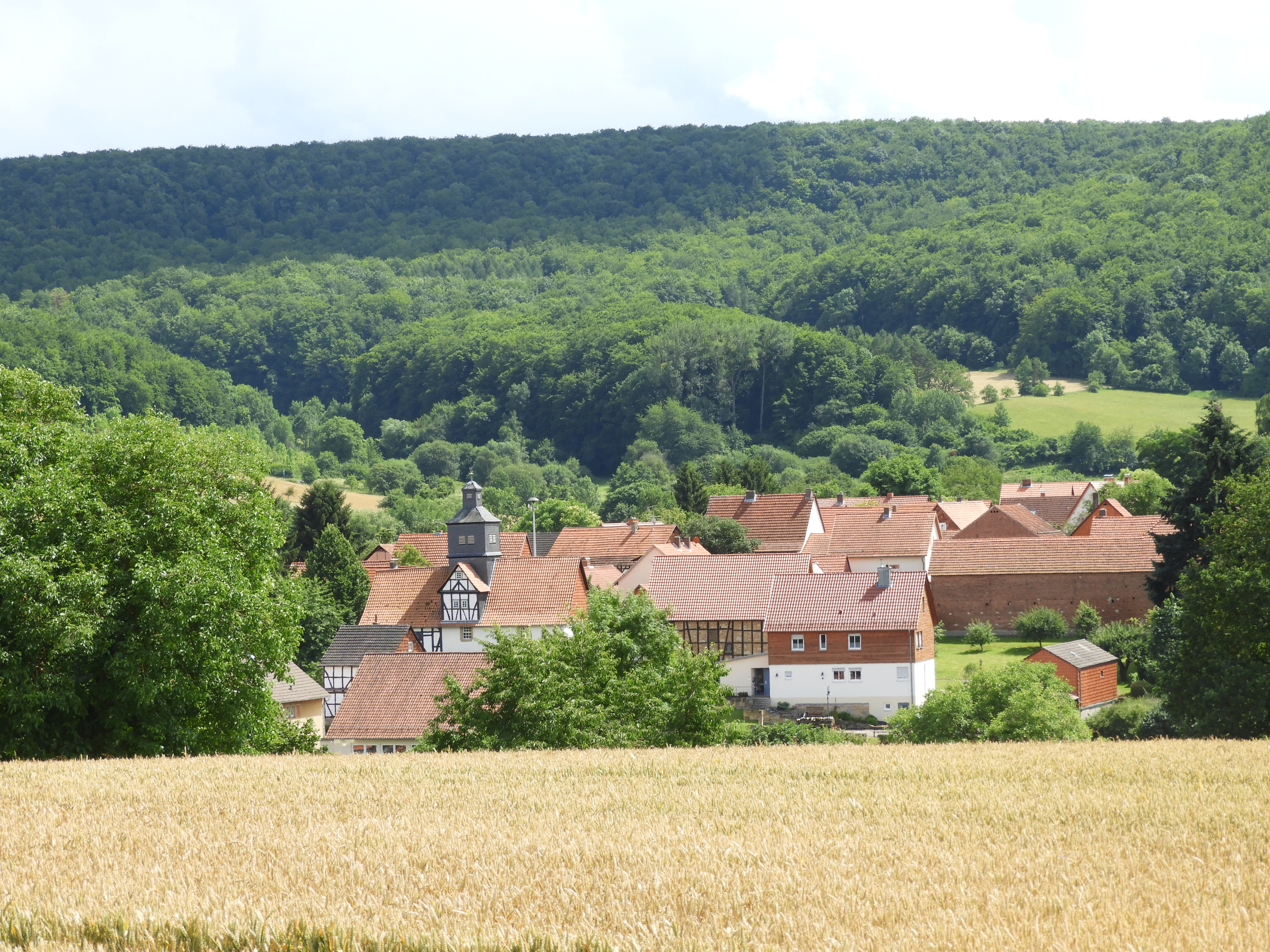 Die historische Ortsstruktur Rambachs verfügt über eine wenig gestörte Bausubstanz, die bis in die Zeit vor dem Dreißigjährigen Krieg zurückreicht. Im Ortskern befinden sich die an exponiertem Platz erbaute Dorfkirche, der Anger und bemerkenswerte Hofanlagen. Besonders markant ist der Einfluss thüringischer Fachwerkarchitektur, der sich an zahlreichen Häusern findet. Als Gesamtanlage ist der Ortskern aus geschichtlichen Gründen denkmalgeschützt. Zitiert aus: Denkmaltopographie Bundesrepublik Deutschland. - Kulturdenkmäler in Hessen. Werra-Meißner-Kreis I, Altkreis Eschwege. Peer Zietz in Zusammenarbeit mit Thomas Wiegand. Braunschweig, Wiesbaden: Vieweg. 1991. ISBN 3-528-06240-1. S. 647 f.